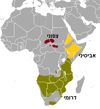 תפוצת תת-המינים של הקודו הגמלוני.